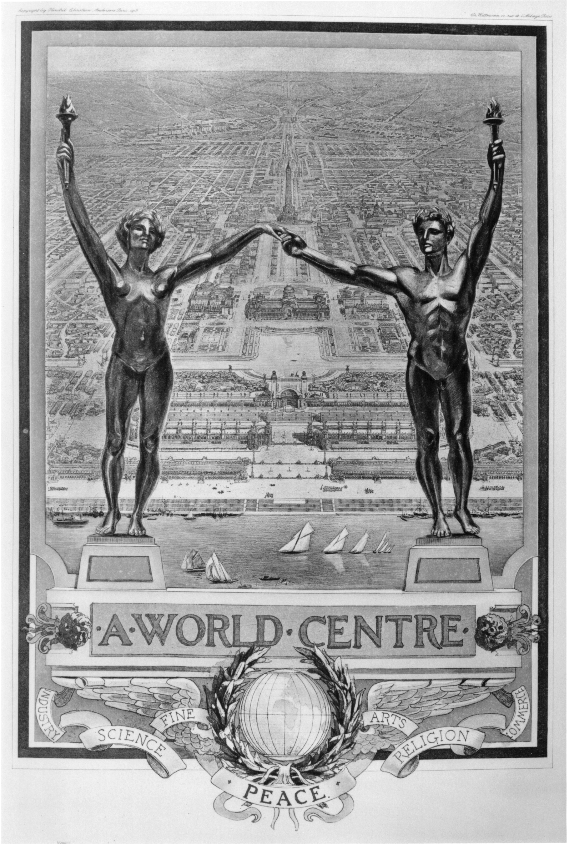 Représentation des colosses à l'entrée principale de la Cité mondiale d'après les plans d'Hendrick Andersen